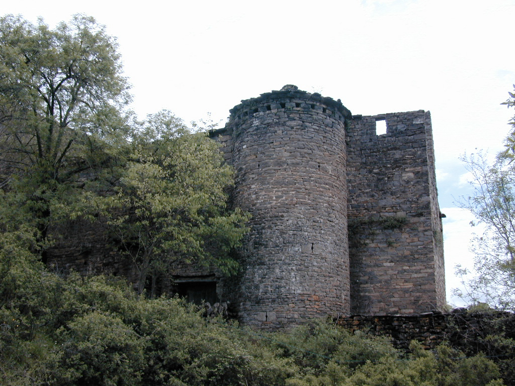 Torre de planta circular adosada en la parte oeste de casa Pallás